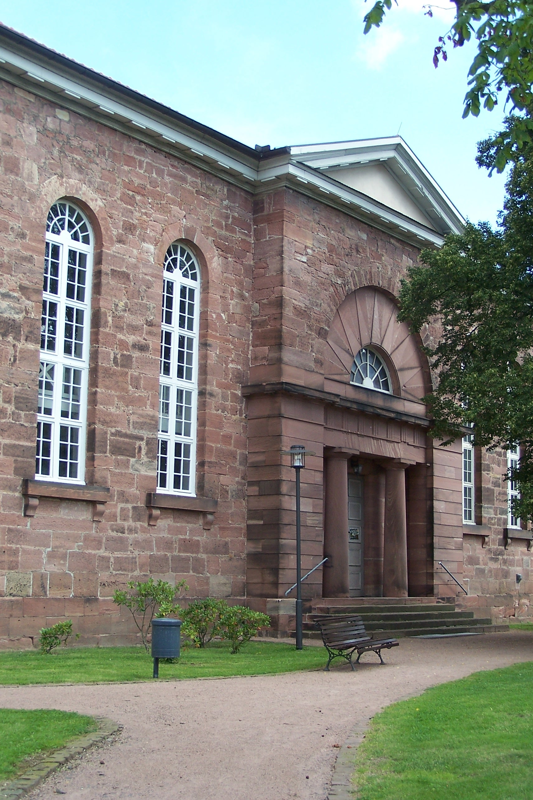 Ansichten und Details der Stadtkirche in Vacha.